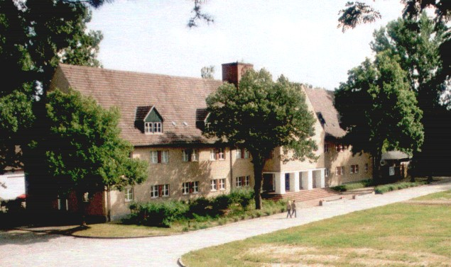 Mahn- und Gedenkstätte KZ Ravensbrück - Ehemalige SS-Kommandantur, heute ua. Museum